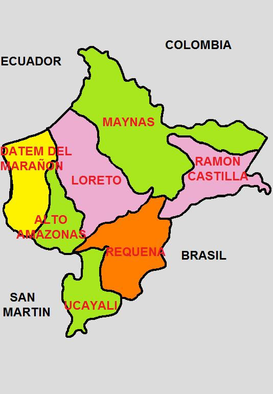 Imagen que muestra la División Politica del Loreto region , una de las 25 circunscripciones en que se divide el Perú